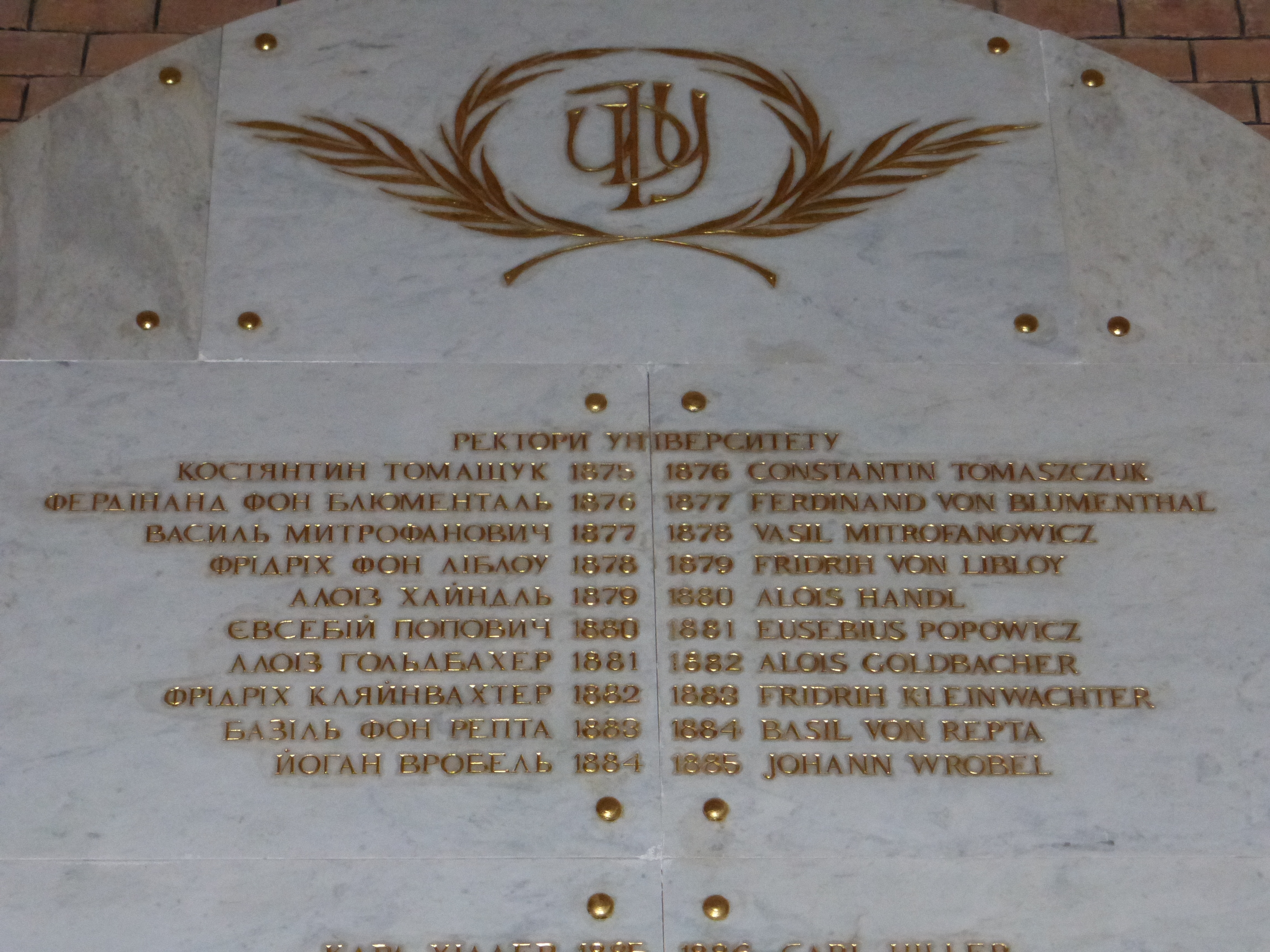 Gedenktafel für die ersten Rektoren der Franz-Josephs-Universität Czernowitz